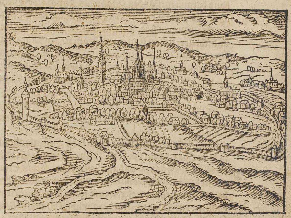 from: Abraham Saur: Theatrum Urbium. Warhafftige Contrafeytung/ und Summarische Beschreibung/ fast aller vornemen und namhafftigen Stätten/ Schlössern und Klöster ..., Frankfurt : Richter, 1610 (Erstausgabe: 1593)